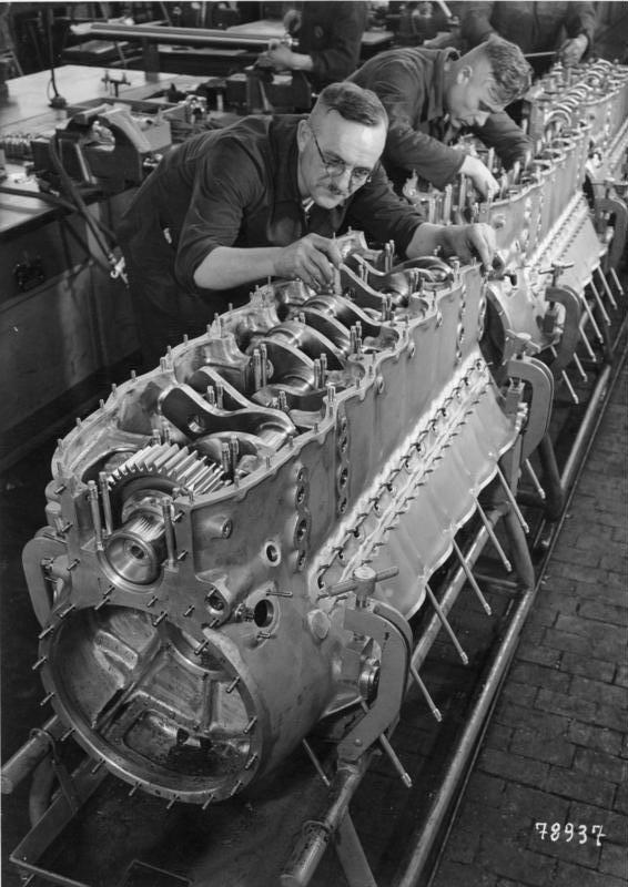 Einbau von Kurbelwellen in Flugmotoren